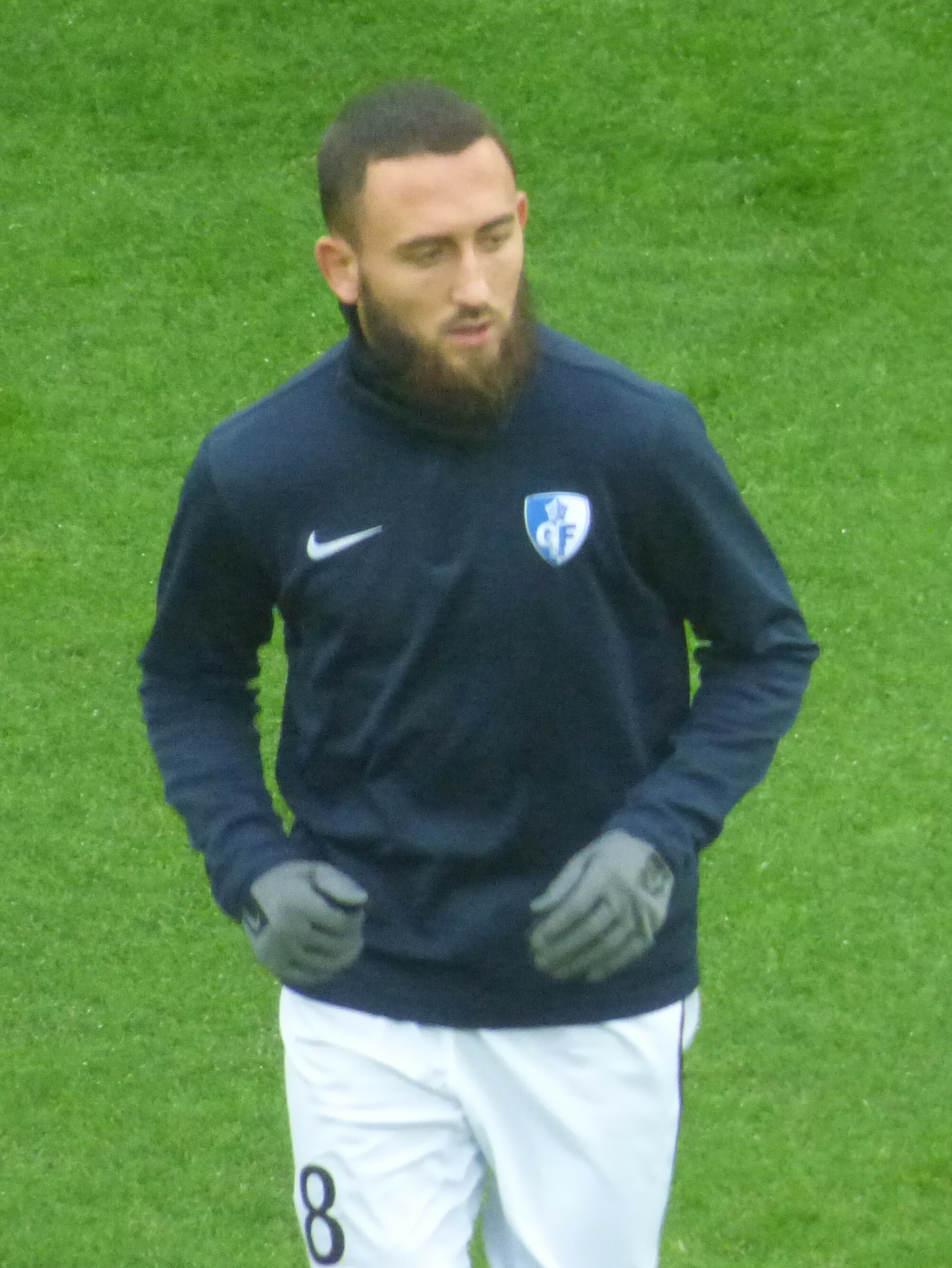 Corentin Tirard avant le match RC Lens / Grenoble Foot 38, le 24 novembre 2018, comptant pour la quinzième journée du championnat de France de football de Ligue 2 2018-2019, au Stade Bollaert-Delelis.